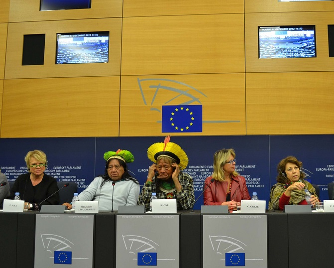 De gauche à droite; Éva Joly, Mégaron, le chef Raoni, Catherine Grèze et Corinne Lepage au parlement européen en 2012.